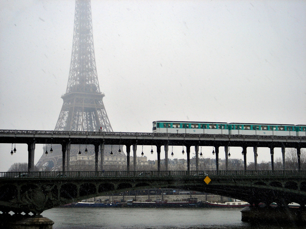 Metro de Paris ligne 6 traversee de la Seine sous la neige